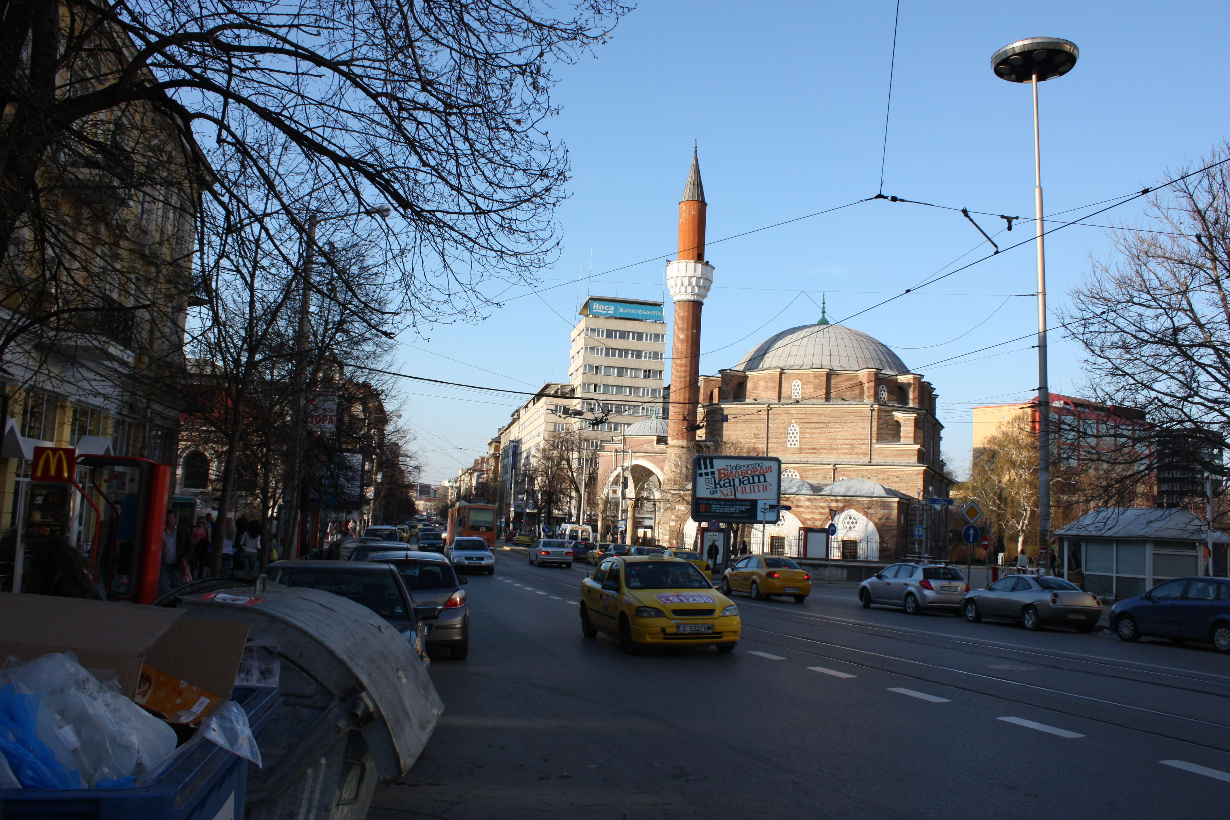 Banya Bashi Mosque, Sofia, Bulgaria, Moschee im Zentrum von Sofia